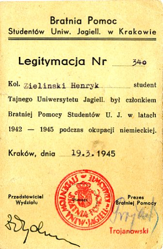 zaświadczenie o uczestnictwie w tajnym nauczaniu na UJ podczas okupacji niemieckiej i o przynależności w tym czasie do "Bratniej Pomocy"